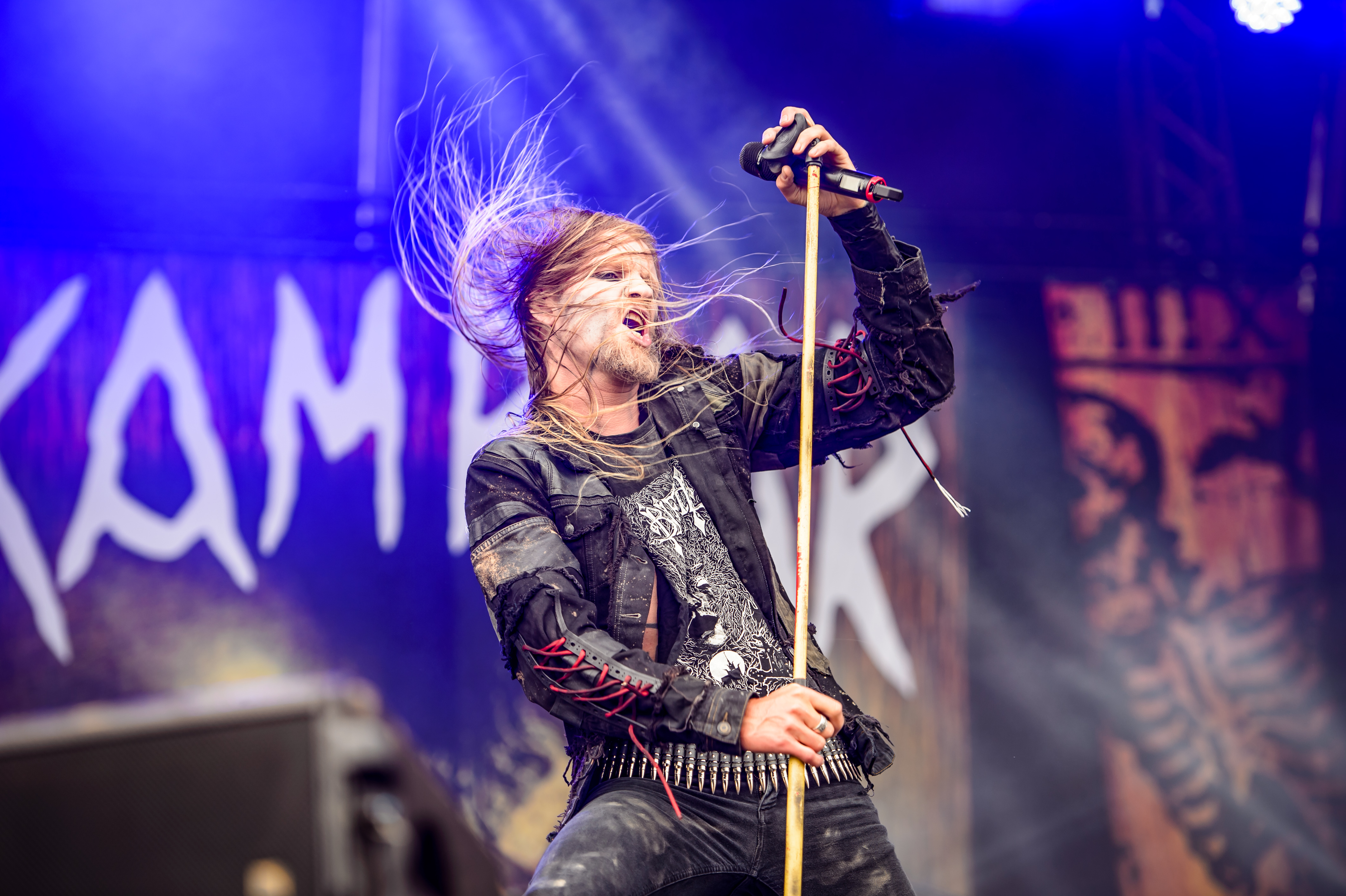 'RockHarz Open Air 2016; Ballenstedt': 'Kampfar'